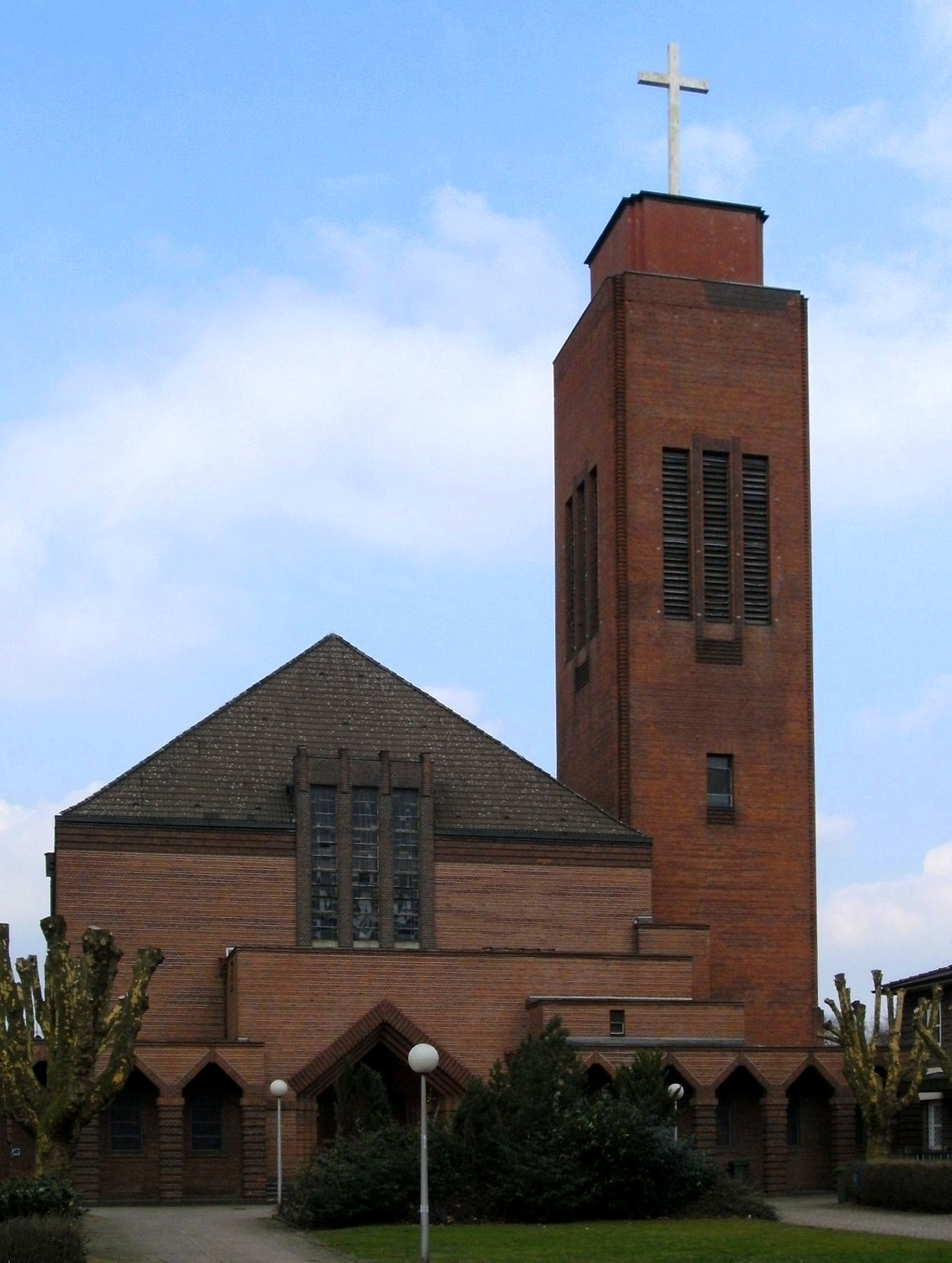 St. Michael in Oberhausen (Rhld.)